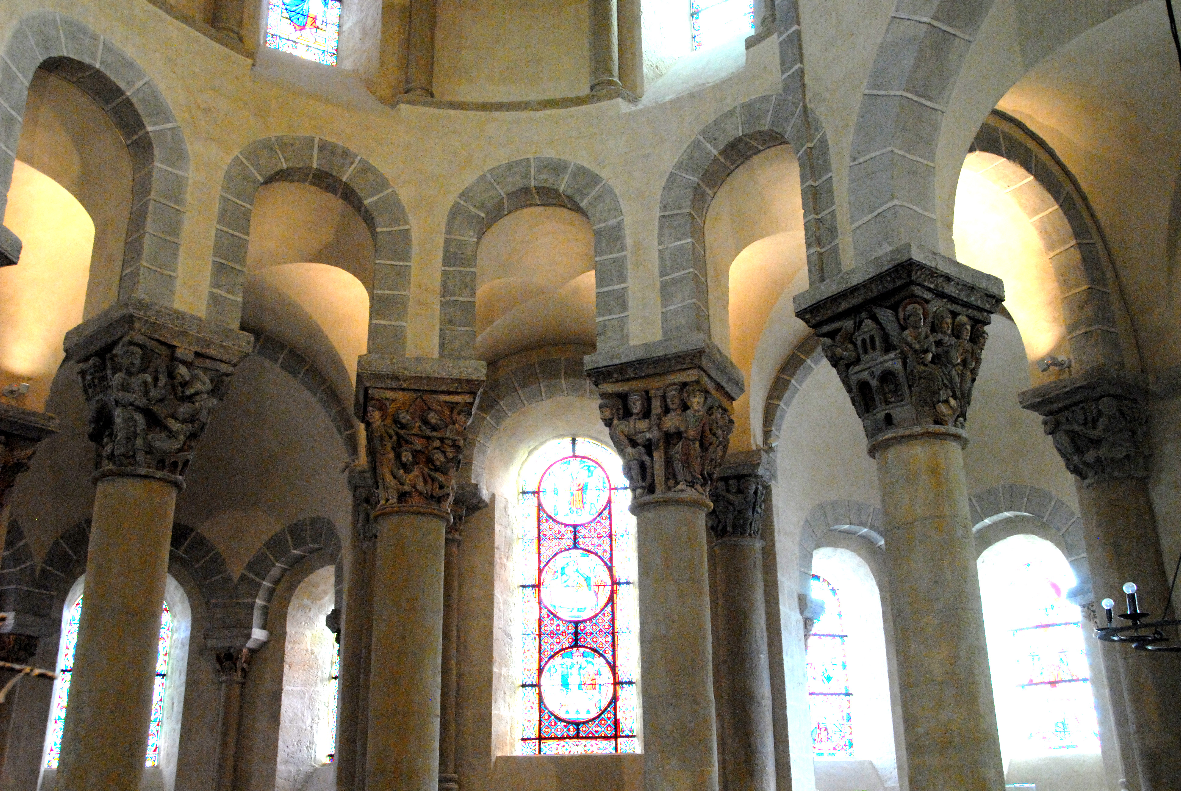 St.-Nectaire, Chorkapitelle der Apsis